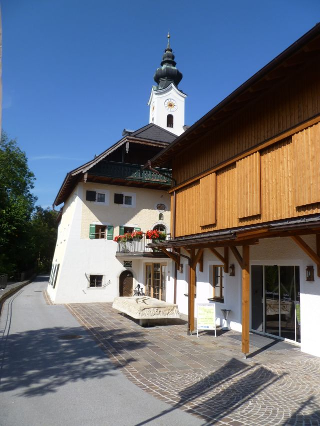 Alte Bachschmiede in Wals